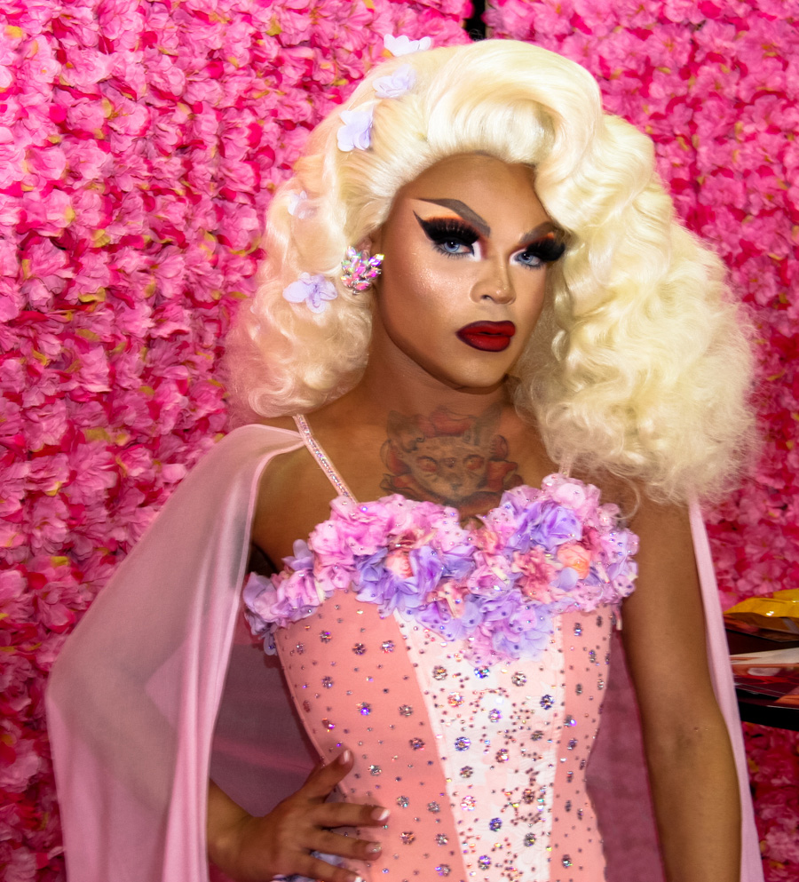 Vanessa Vanjie Mateo at RuPaul's DragCon LA 2018